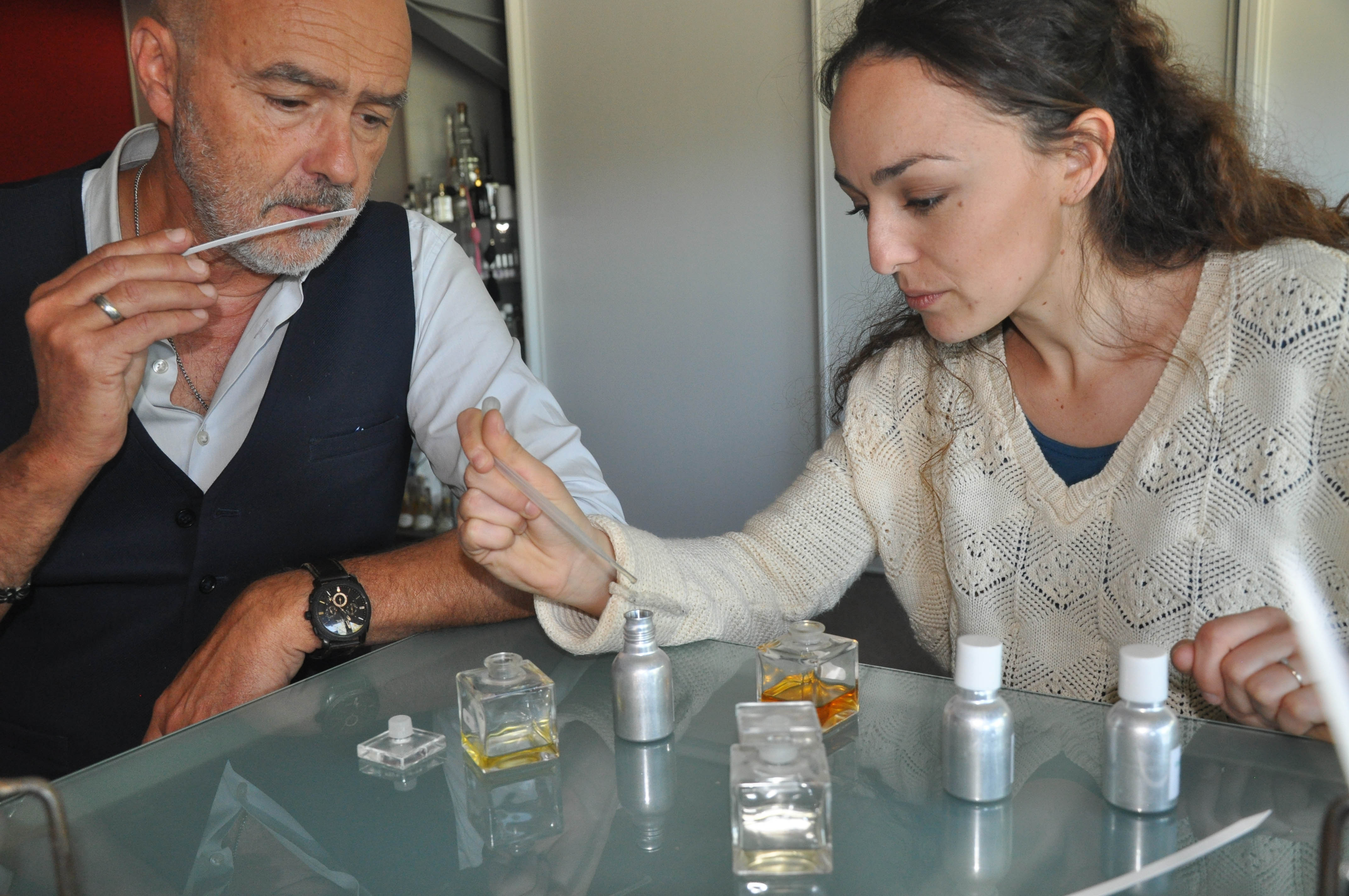 Les nez en action